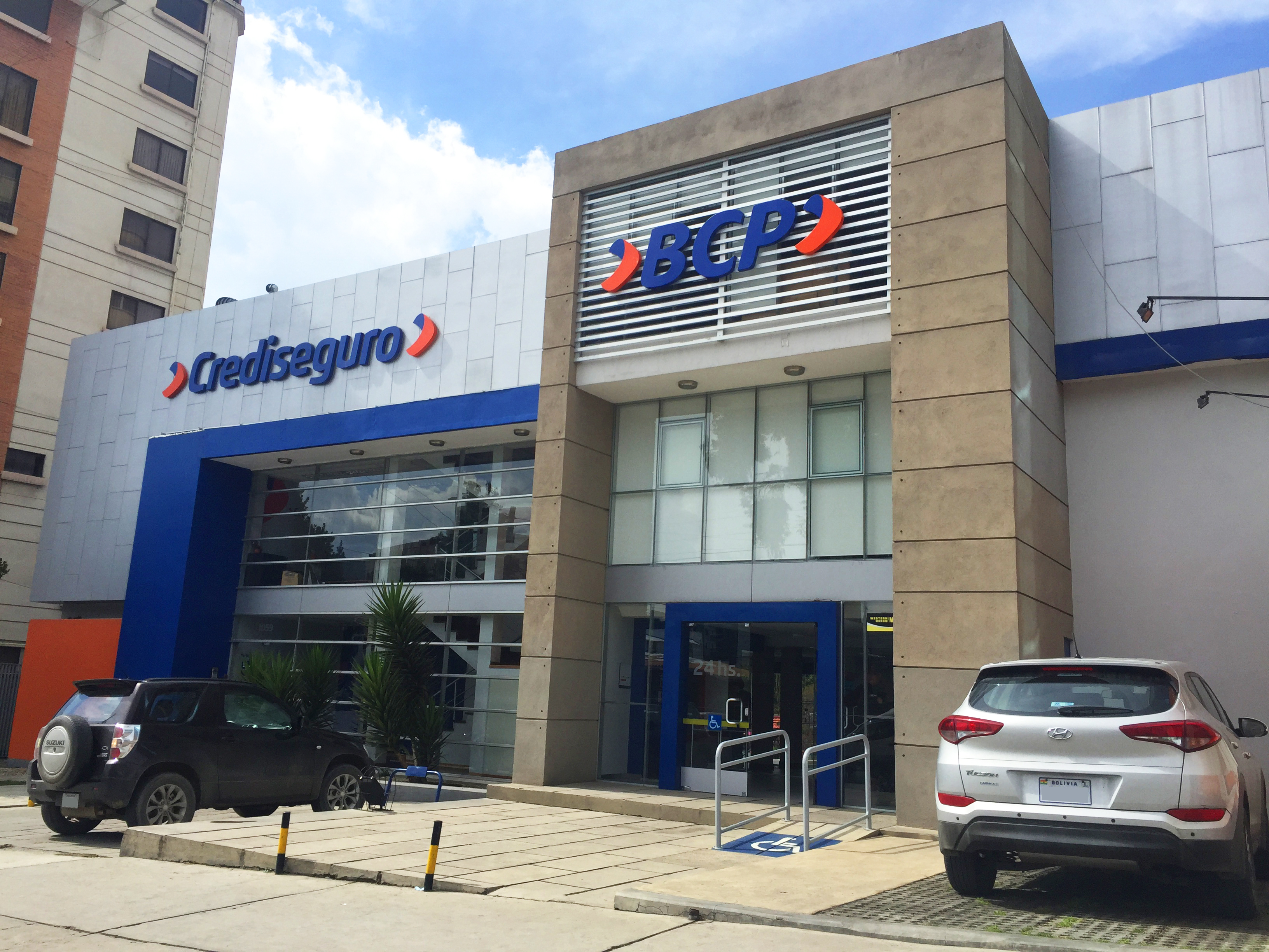 Sucursal de Banco de Crédito de Bolivia en La Paz.